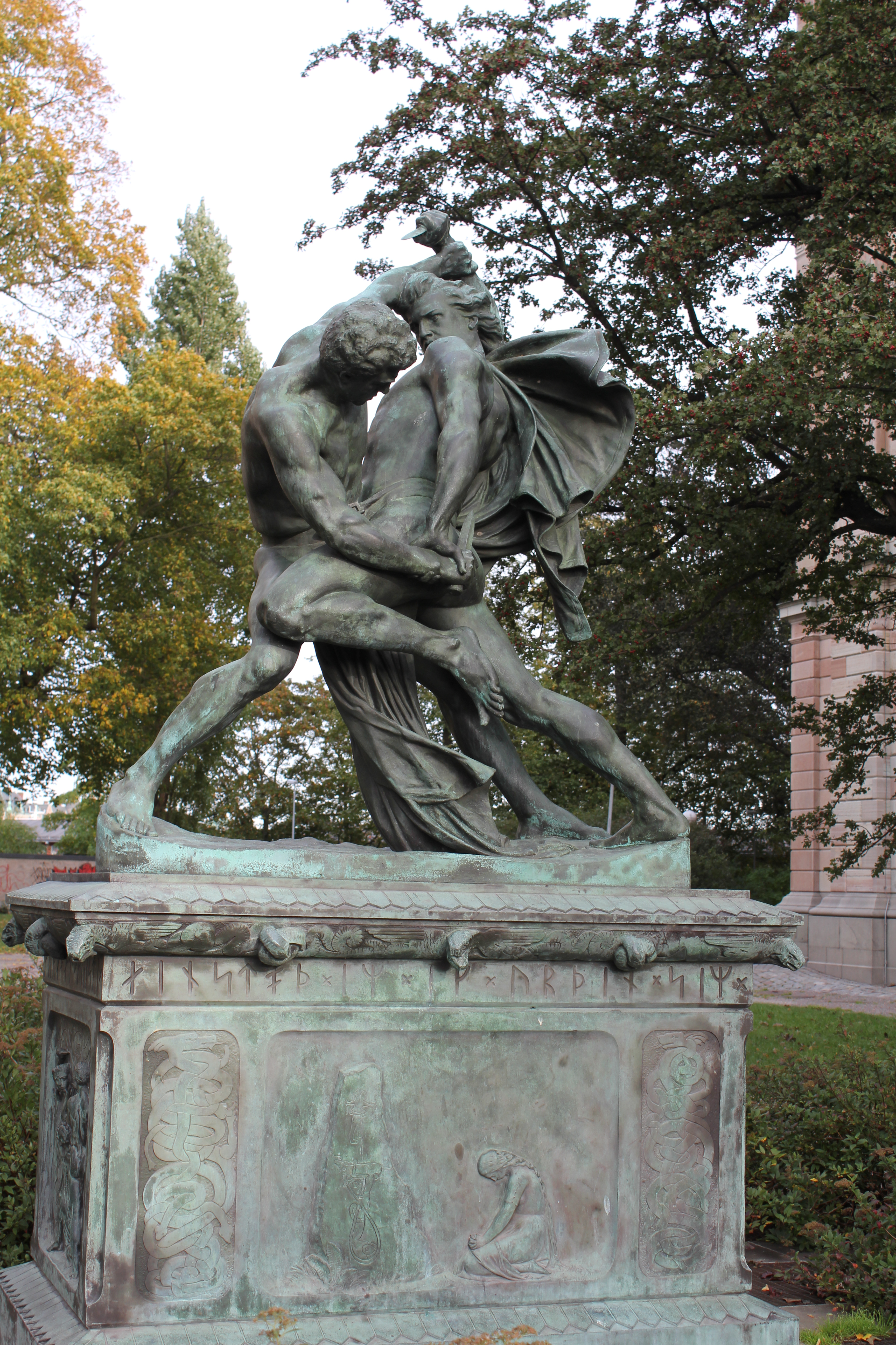 Bältesspännarna av Johan Peter Molin, 1867 i Museiparken på Blasieholmen.